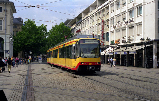 Stadtbahn car on Kaiserstrasse